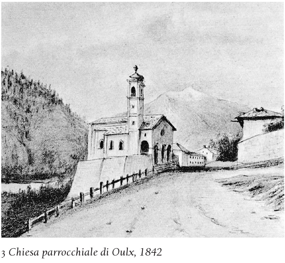 Disegno della chiesa parrocchiale di Oulx, 1842